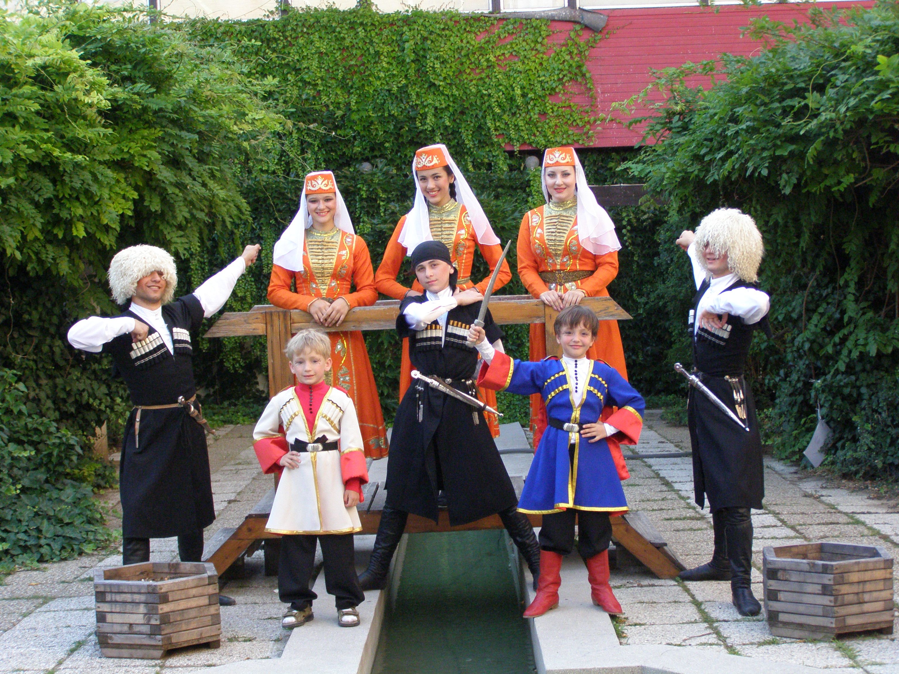 cherkess7